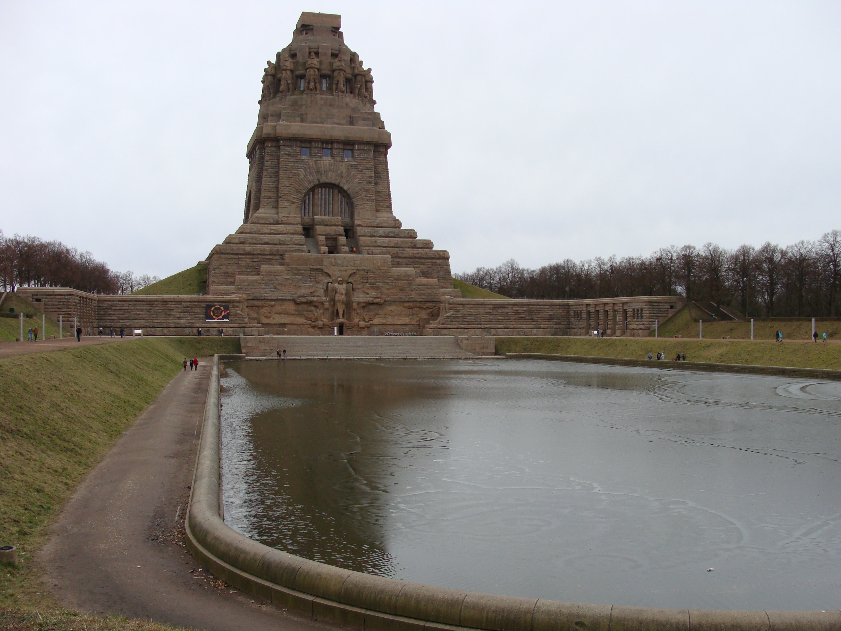 Das Völkerschlachtdenkmal bei Leipzig, mit See der Tränen.